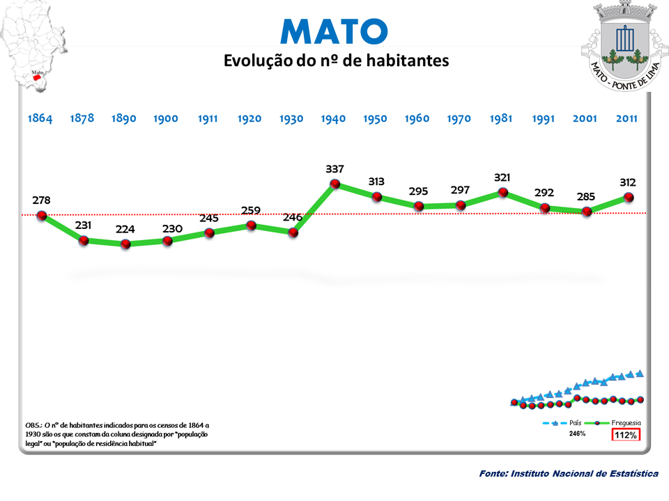 Cenos 1864/2011